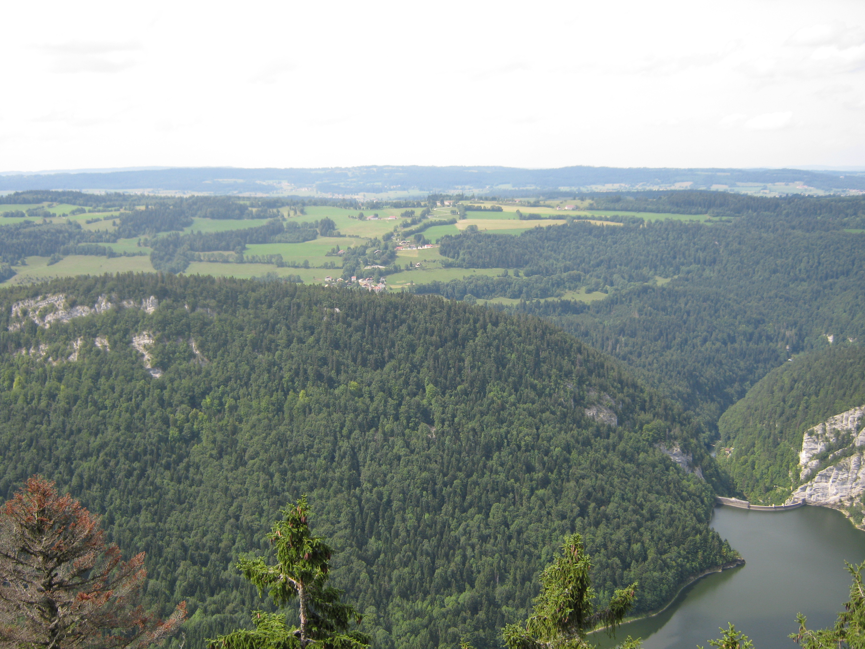 Vue sur les côtes du Doubs, le barrage du Châtelot et le côté français de la région, pris depuis le côté suisse en août 2009.